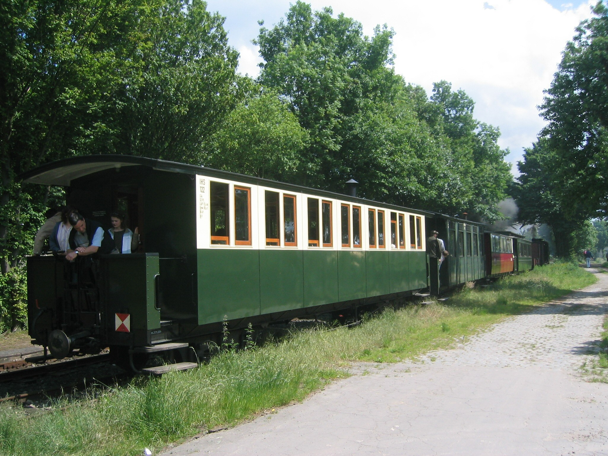 Selfkantbahn trein